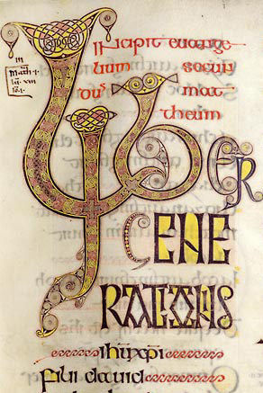 Enluminiure issue des évangiles d'Echternach